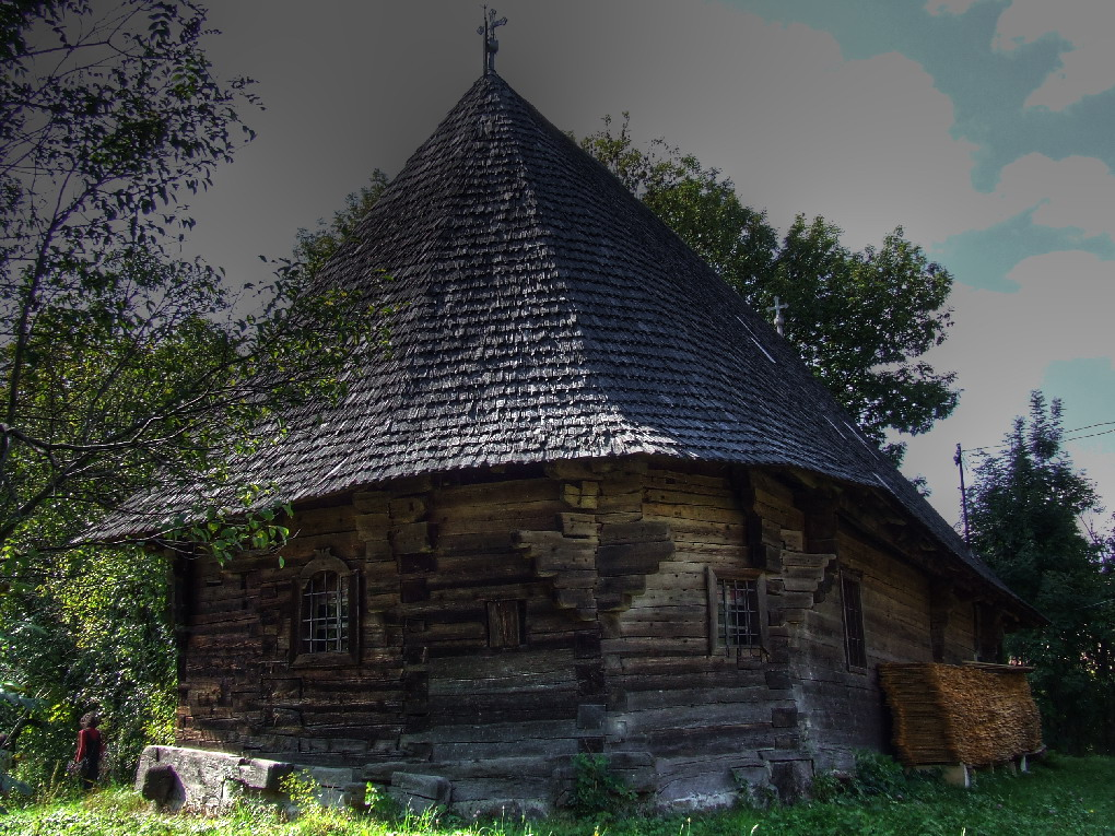 Biserica de lemn din Urişiu de Jos, judeţul Mureş. Vedere din est.